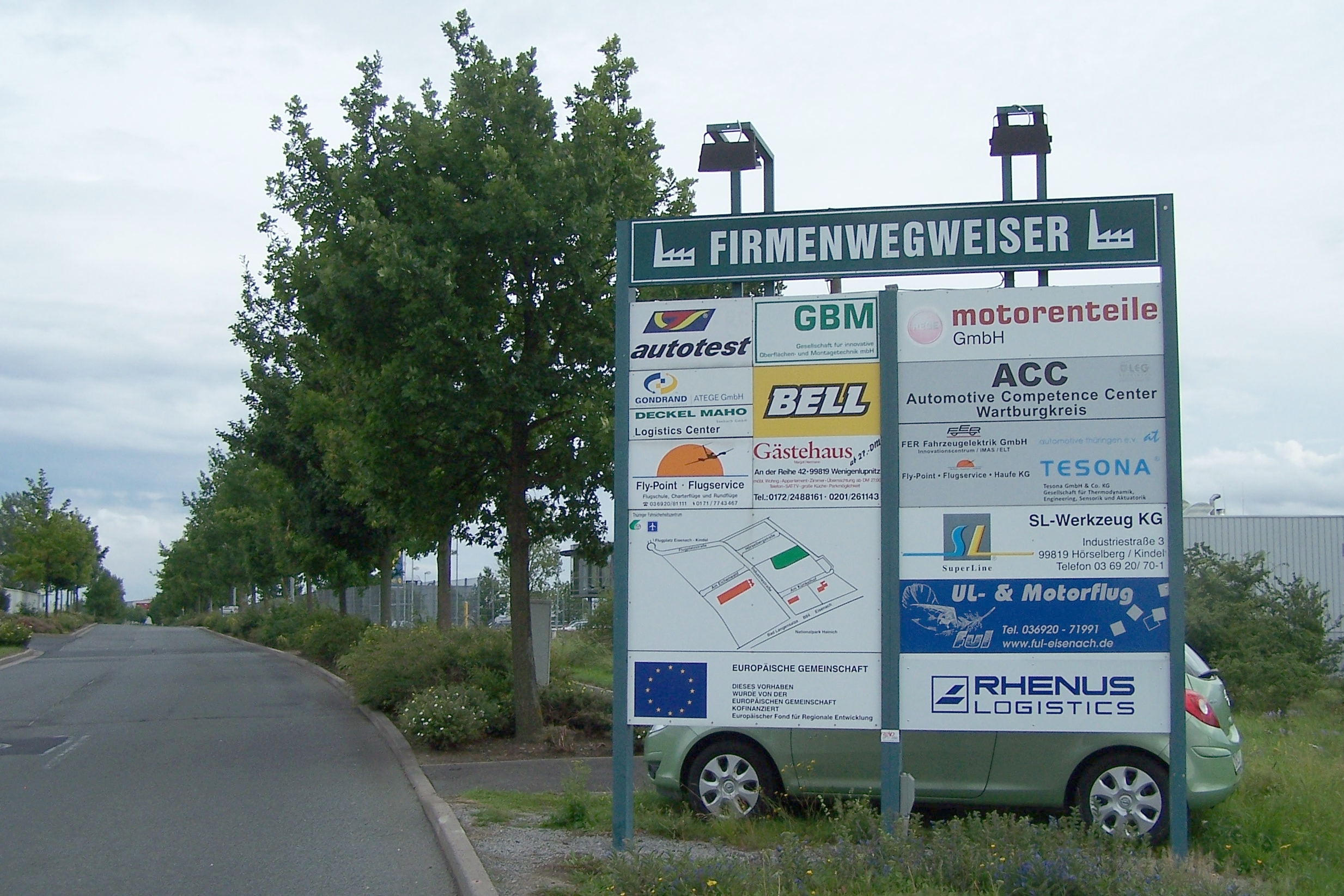 Orientierungstafel an der Hauptzufahrt.